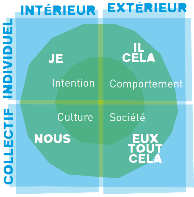 AQAL Modèle selon Université du Nous Formation Gouv Partagée